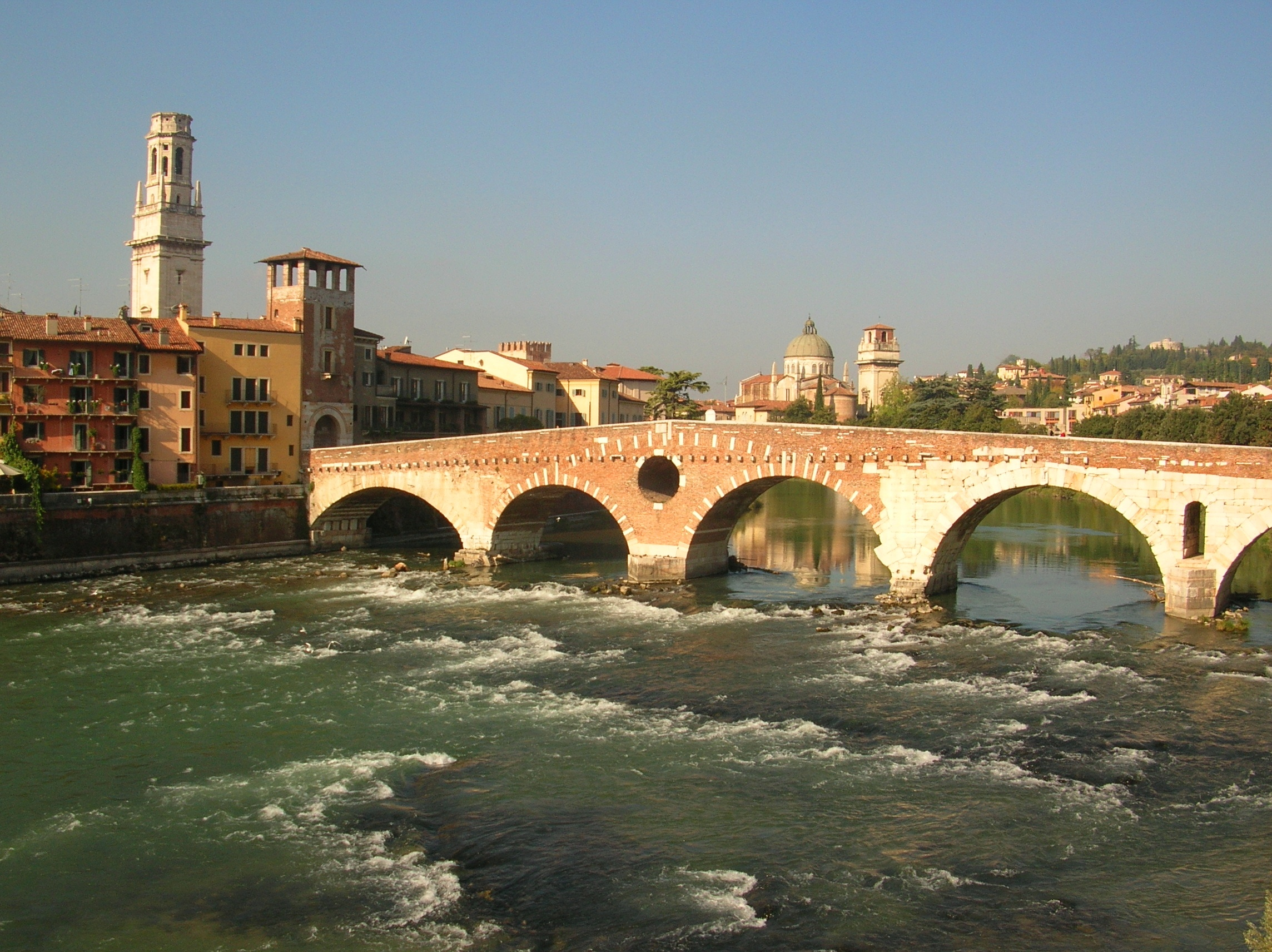 ponte Pietra